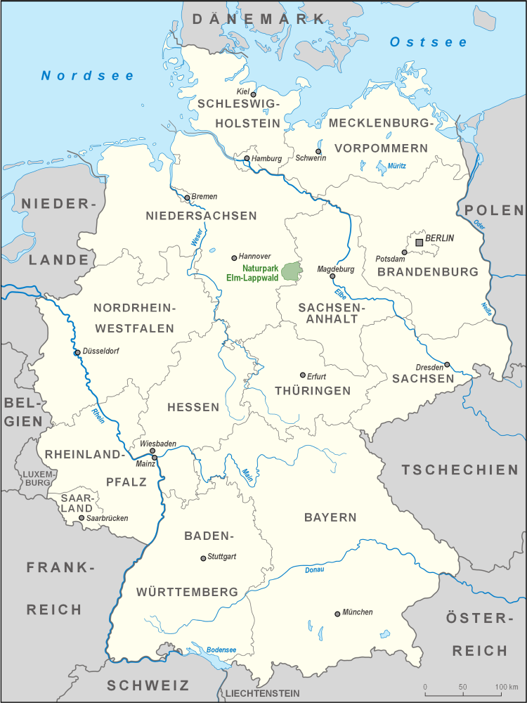 Karte des Naturparks Elm-Lappwald in Deutschland